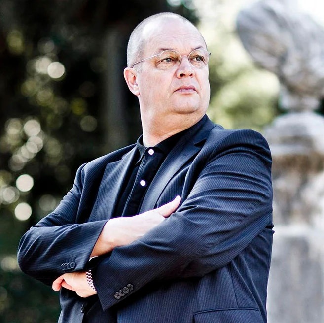 Joachim Blüher im Garten der Villa Massimo, 2018 aufgenommen von Till Brönner